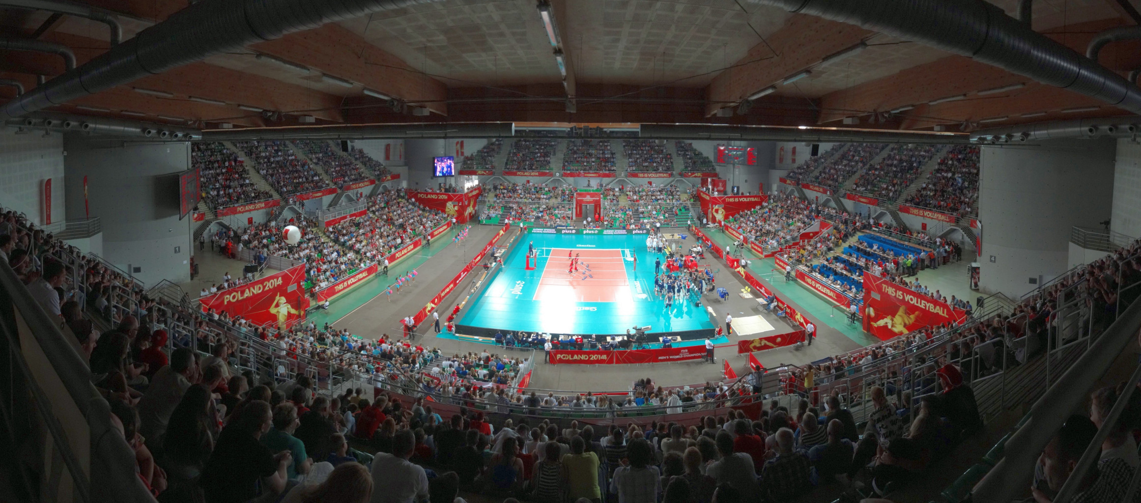 Mecz drugiej fazy grupowej Argentyna - Stany Zjednoczone (3:2) w hali widowiskowo-sportowej "Łuczniczka" w Bydgoszczy podczas Mistrzostw Świata w Piłce Siatkowej Mężczyzn 2014